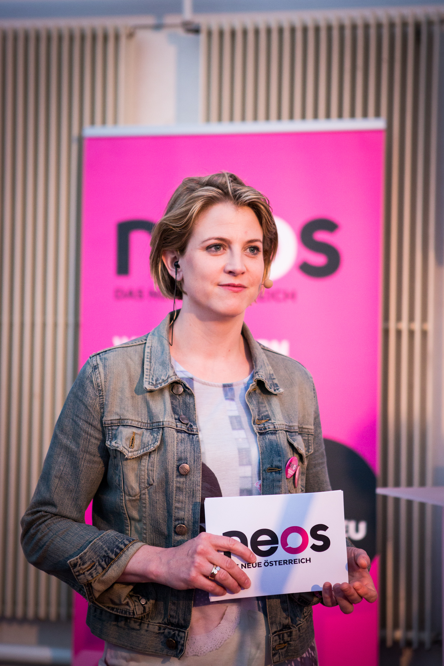 Beate Meinl-Reisinger, stellvertretende Vorsitzende von NEOS - Das Neue Österreich und Liberales Forum beim NEOS-Event Es geht auch anders! Das FEST! (Foto cc-by-sa Nicole Heiling)